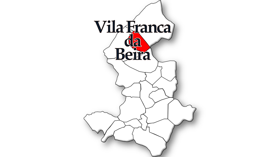 População